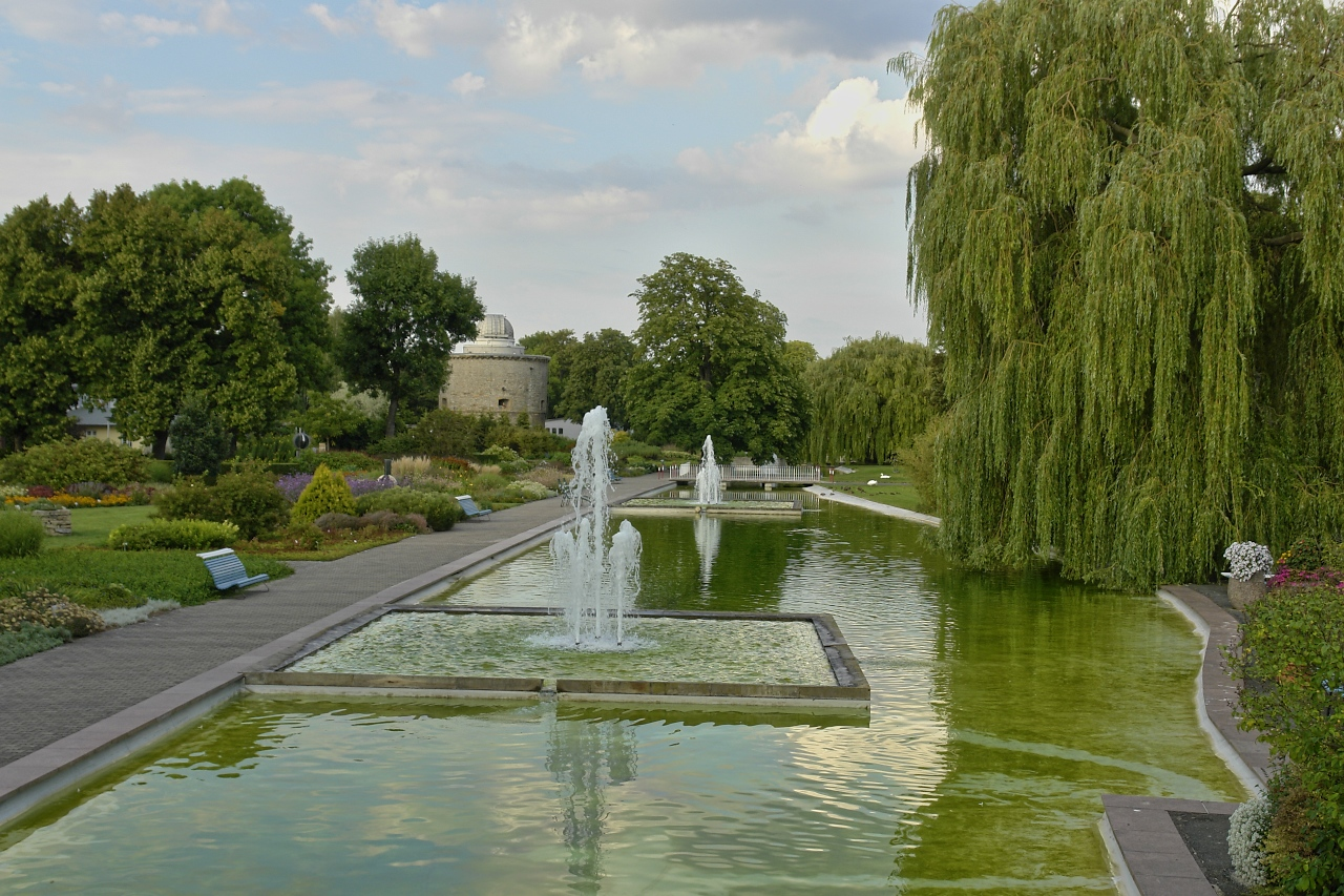 Wasserachse